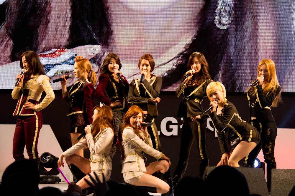 Lg전자가 3월 31일, 4월 1일 양일간 서울 잠실동 롯데월드 아이스링크에서 'lg 시네마3d 월드페스티벌'을 성황리에 개최했다. ※ LG전자 뉴스룸 에서 관련 보도자료를 확인실 수 있습니다.